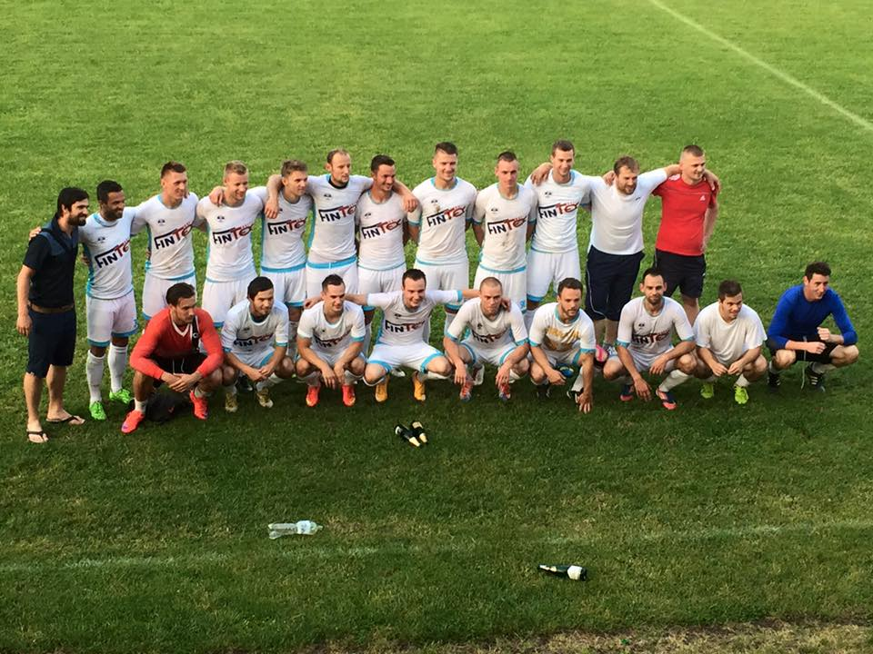 Mužstvo po postupe do druhej najvyššej súťaže po dlhých 15. rokoch